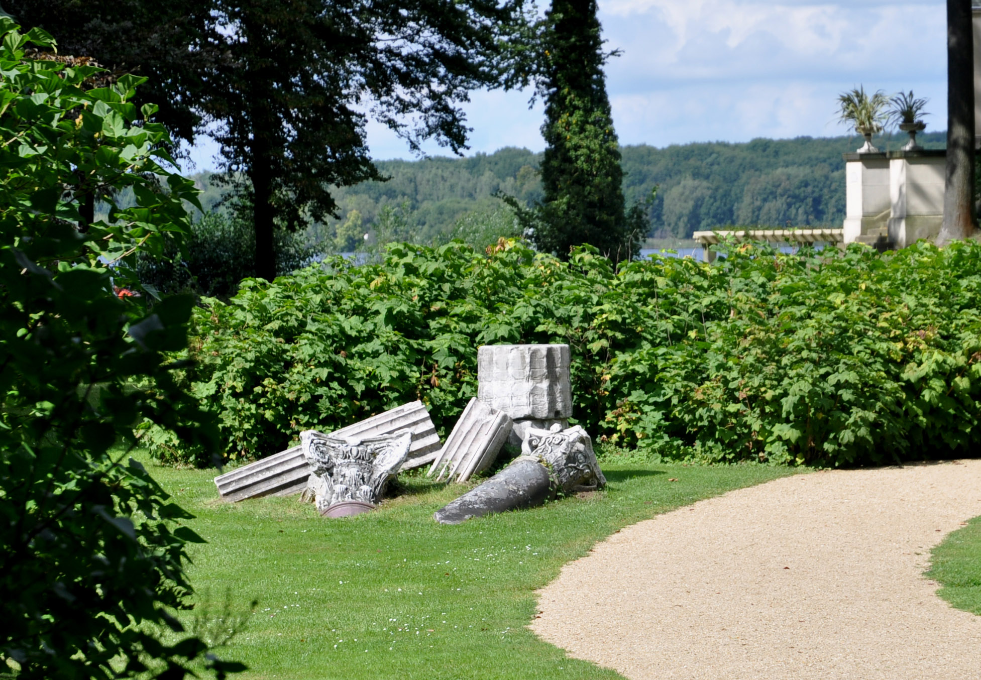 Das Arrangement aus antiken Säulentrümmern im Park Klein-Glienicke